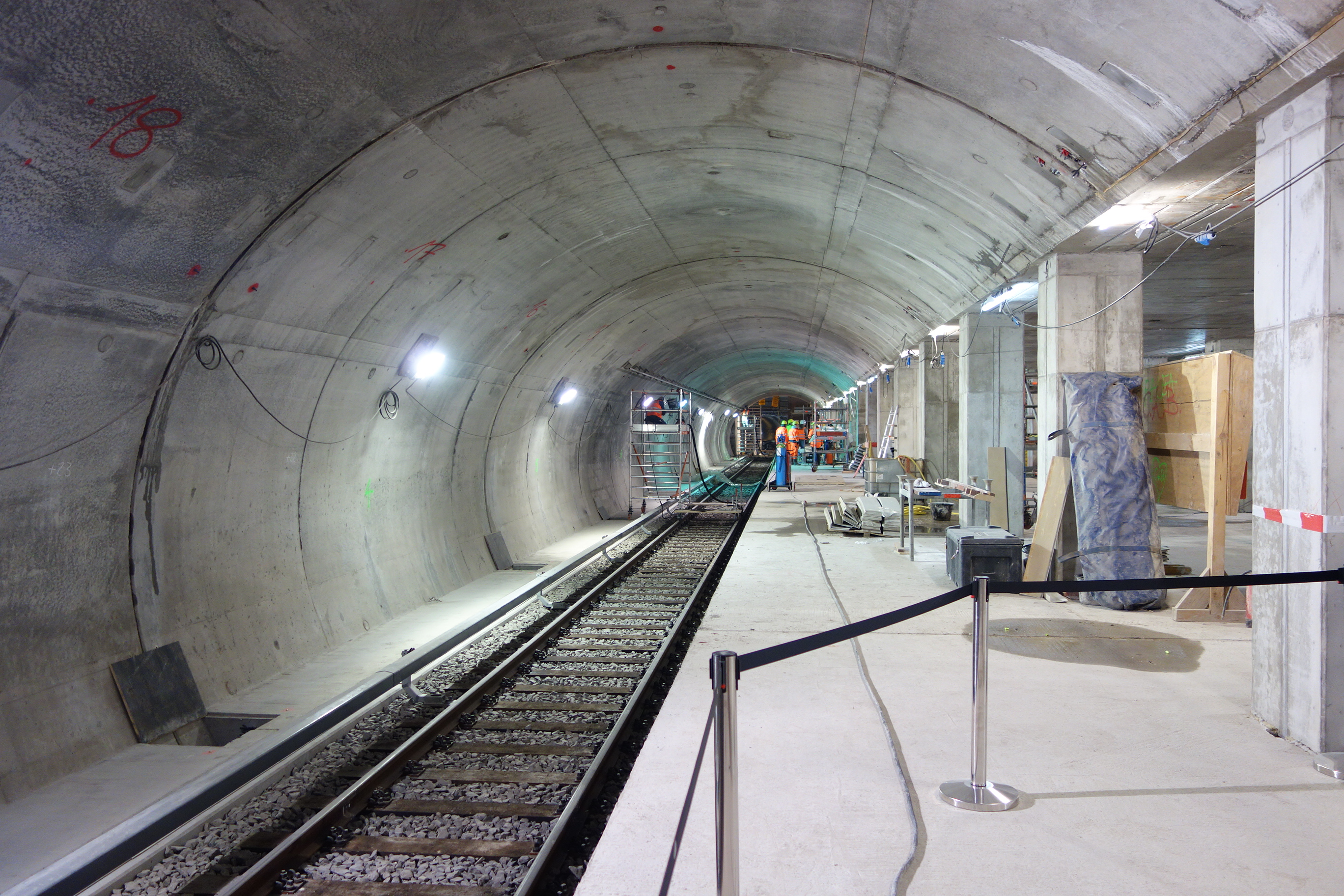 U-Bahnhof Museumsinsel, Bahnsteigbereich am südlichen Gleis, Bauzustand Februar 2020 (Richtfest)